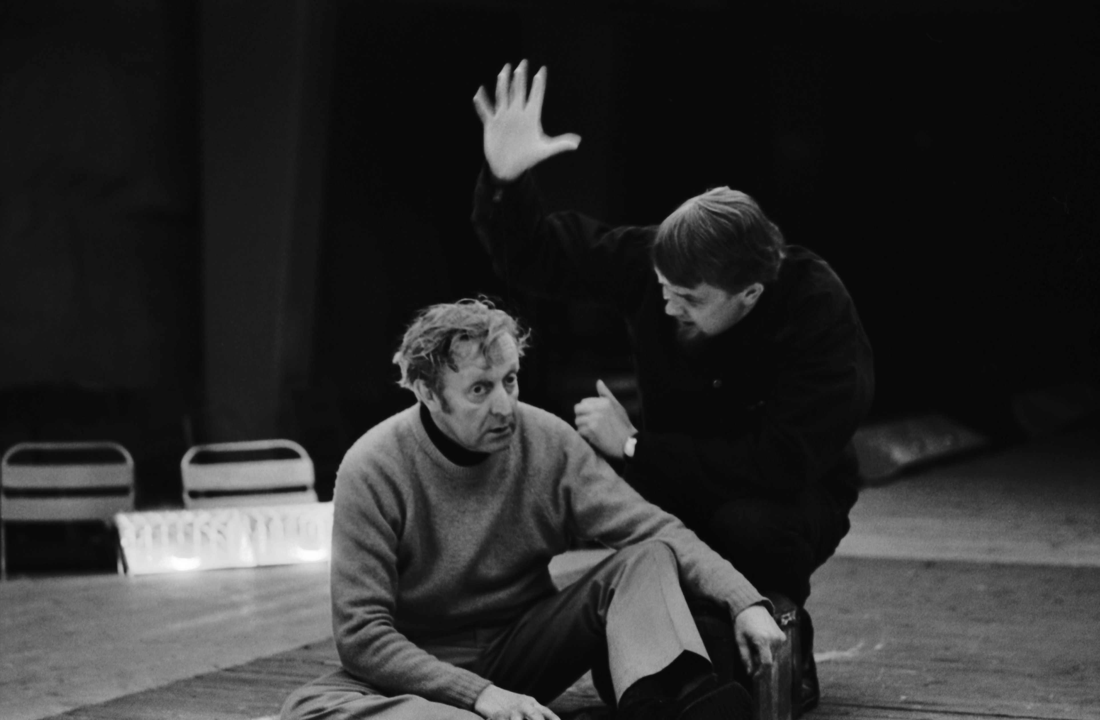 Ohjaaja Kalle Holmberg ohjaamassa Schillerin Rosvot-näytelmän harjoituksia Bunkkeriteatterissa Helsingin Kaupunginteatterin vieressä olevassa Eläintarhantien kallioväestönsuojassa. Edessä näyttelijä Olavi Ahonen.